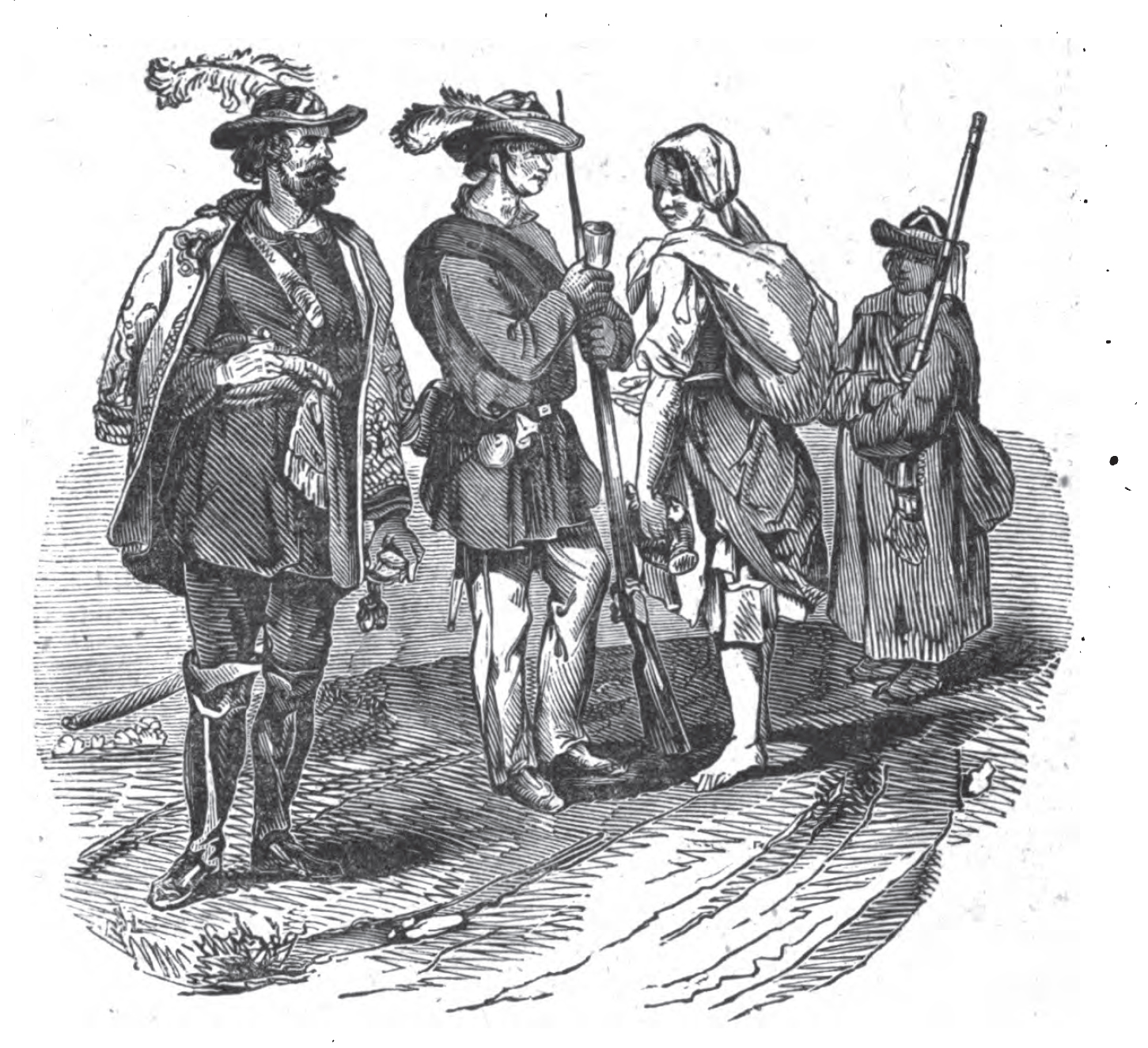 Slovenskí dobrovoľníci s dievčaťom.